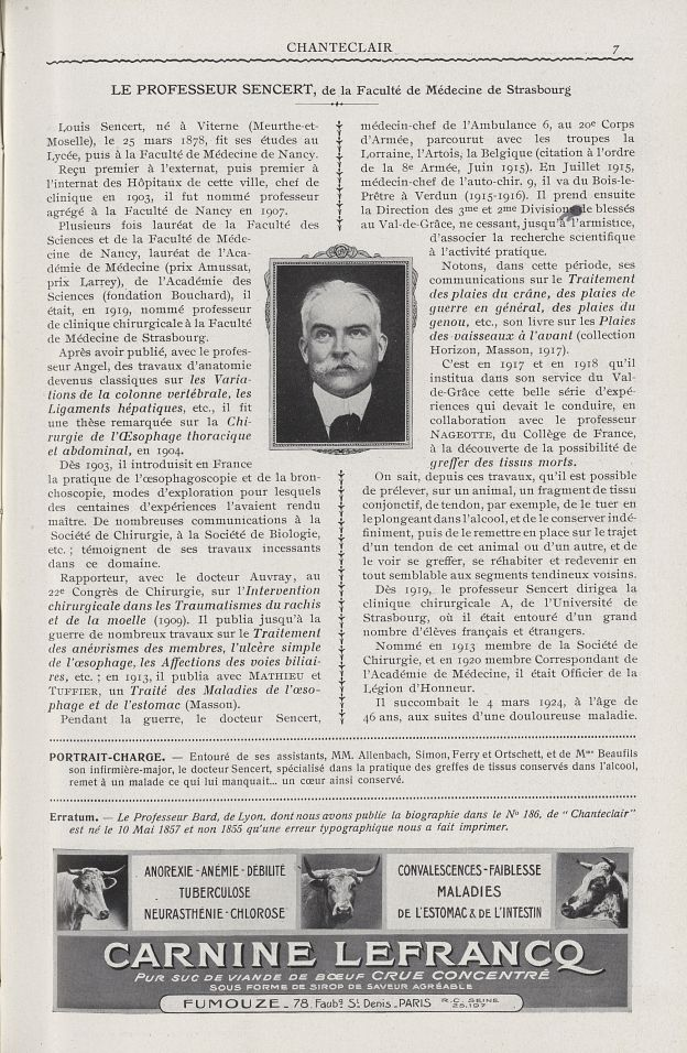 Chanteclair . - 1924. - 19e année Pour établir des liens vers ce document, utiliser les URL ci-dessous : Livre : Page